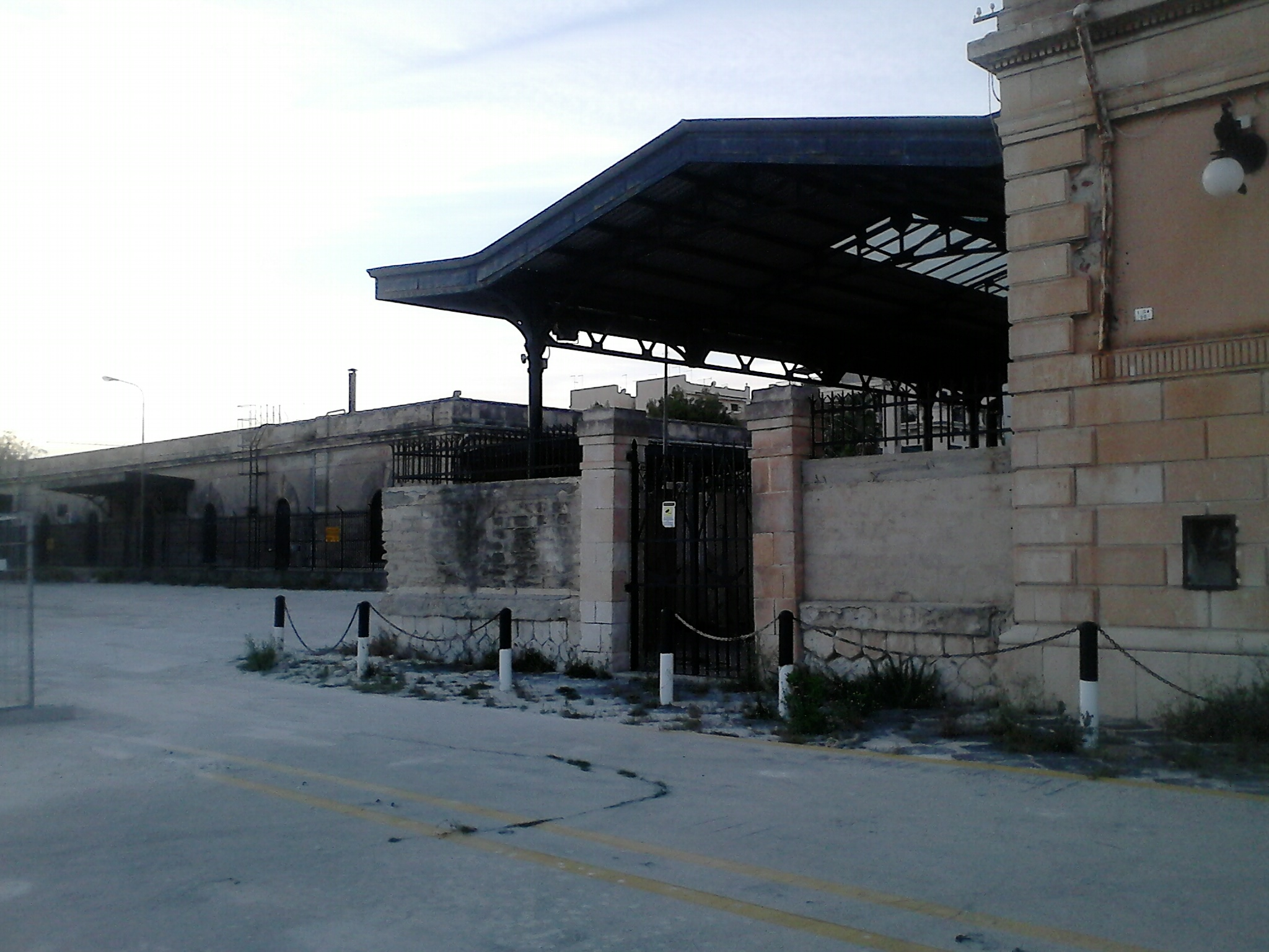 Edificio di lato e tettoia metallica